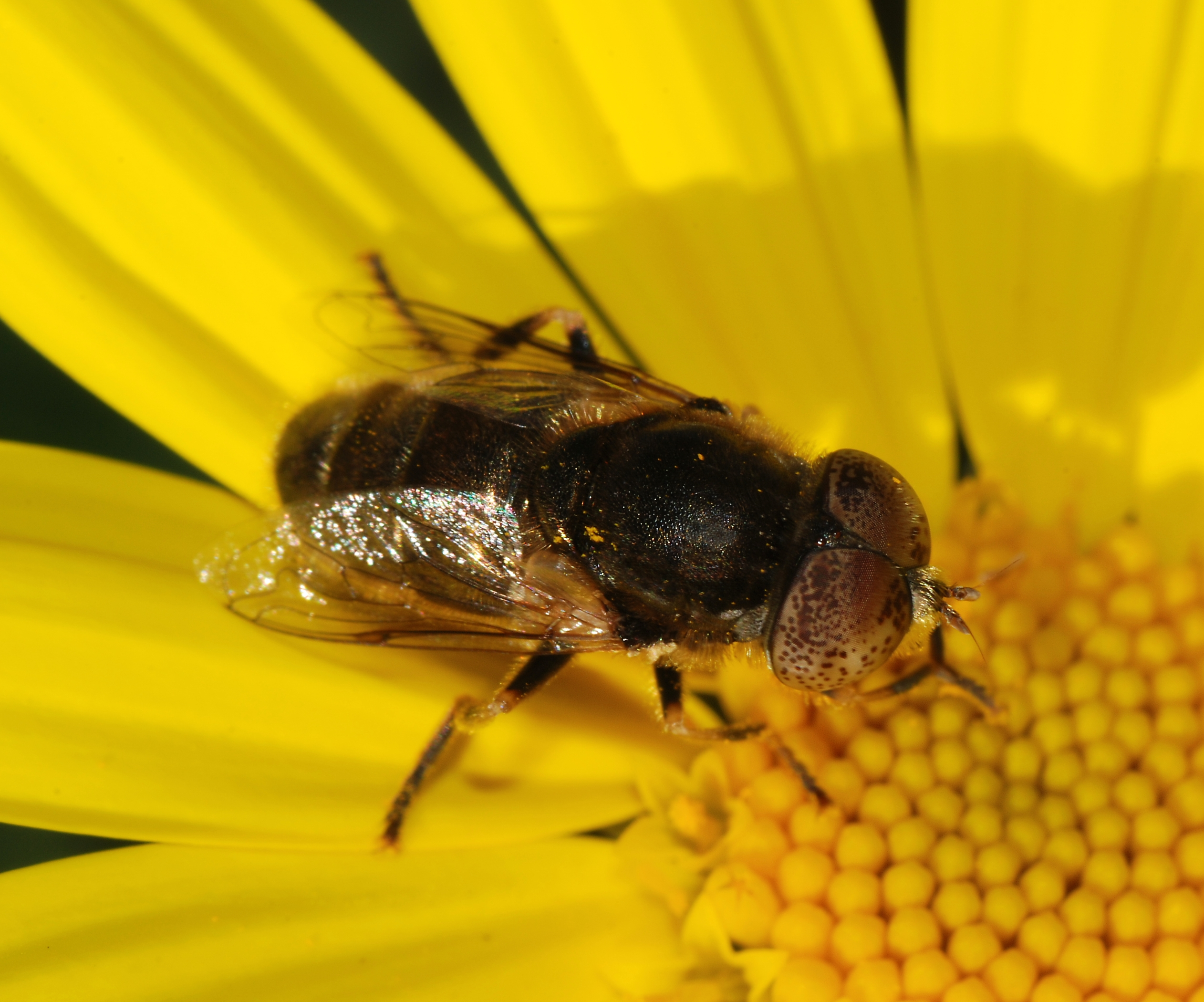 A male hoverfly (Eristalinus aeneus)